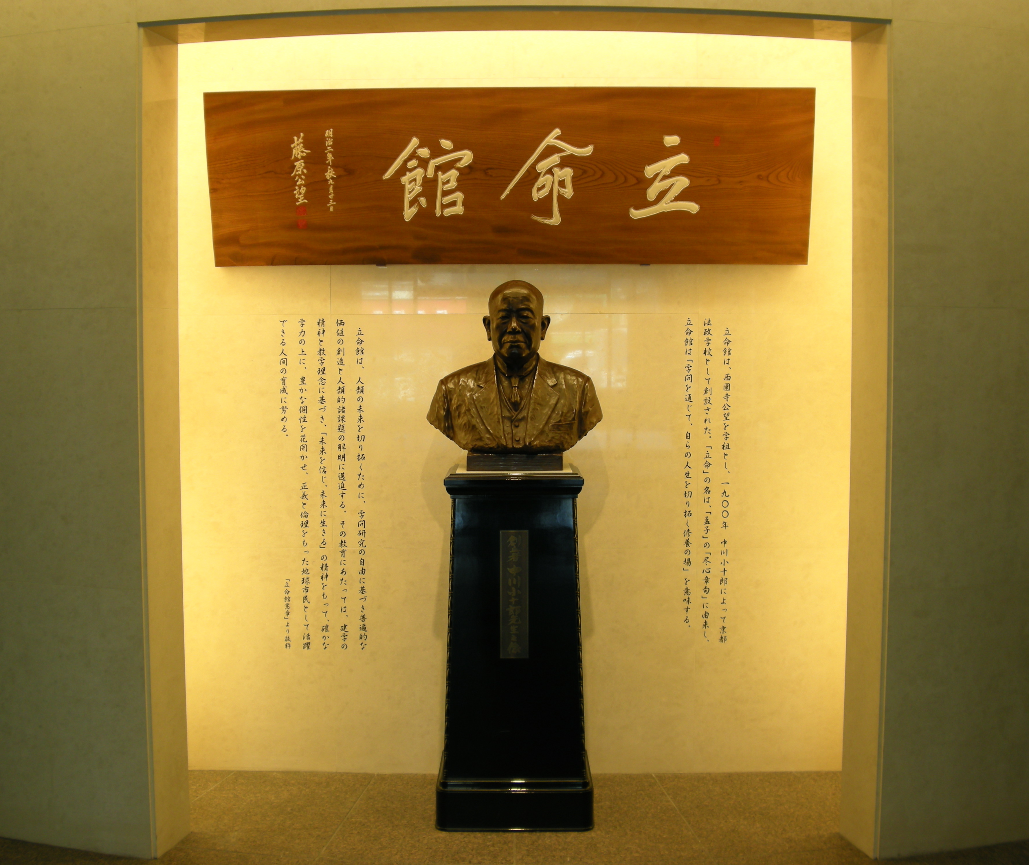 Main Entrance Hall, Nakagawa Hall (Ritsumeikan, Kyoto, Japan)